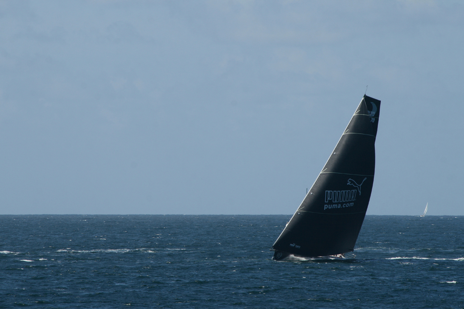 Puma durant la Volvo Ocean Race venant de Lorient allant vers les coureaux de Belle-Ile